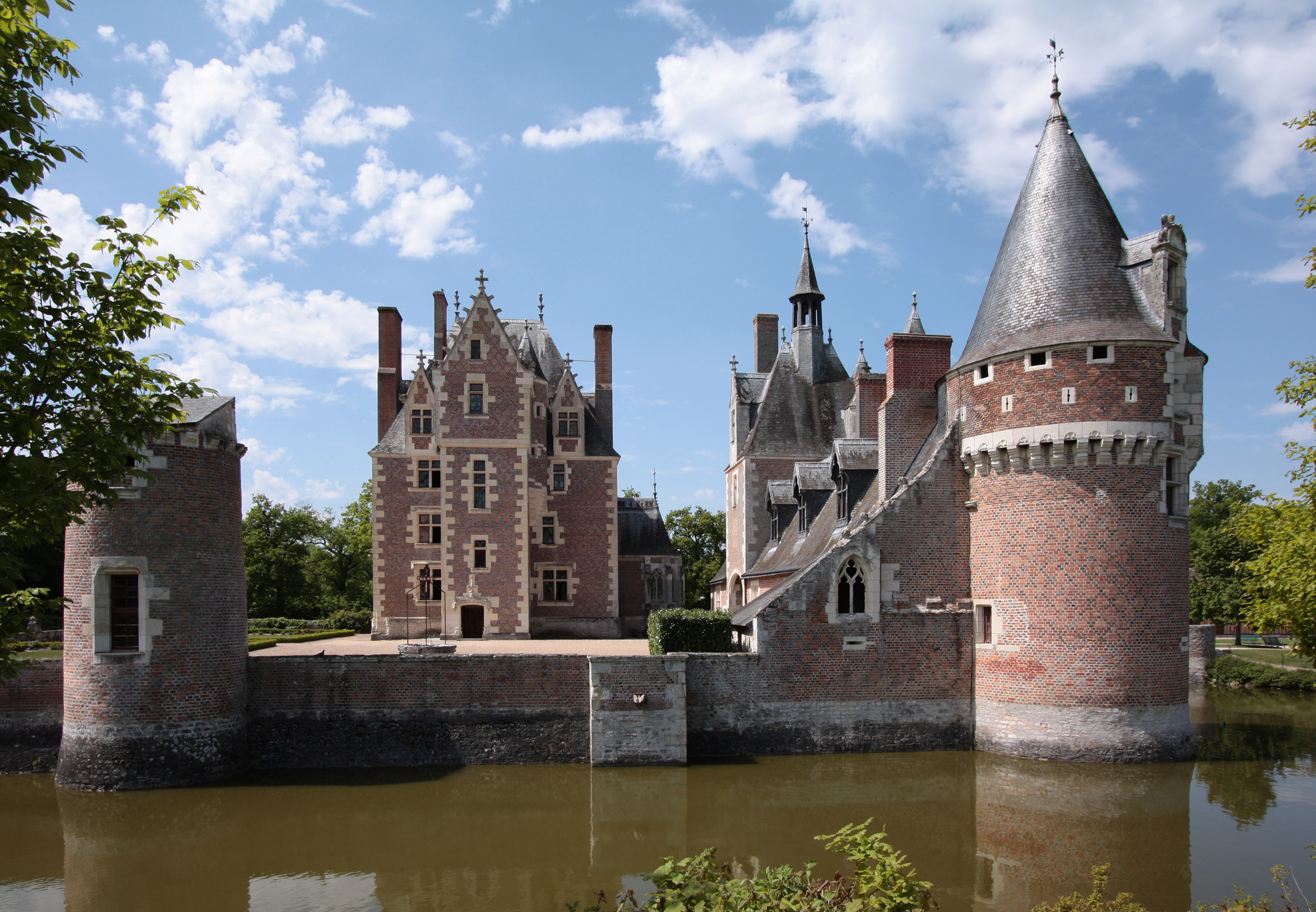 Schloss Le Moulin in der Kommune Lassay-sur-Croisne im Departement Loir-et-Cher/Frankreich.